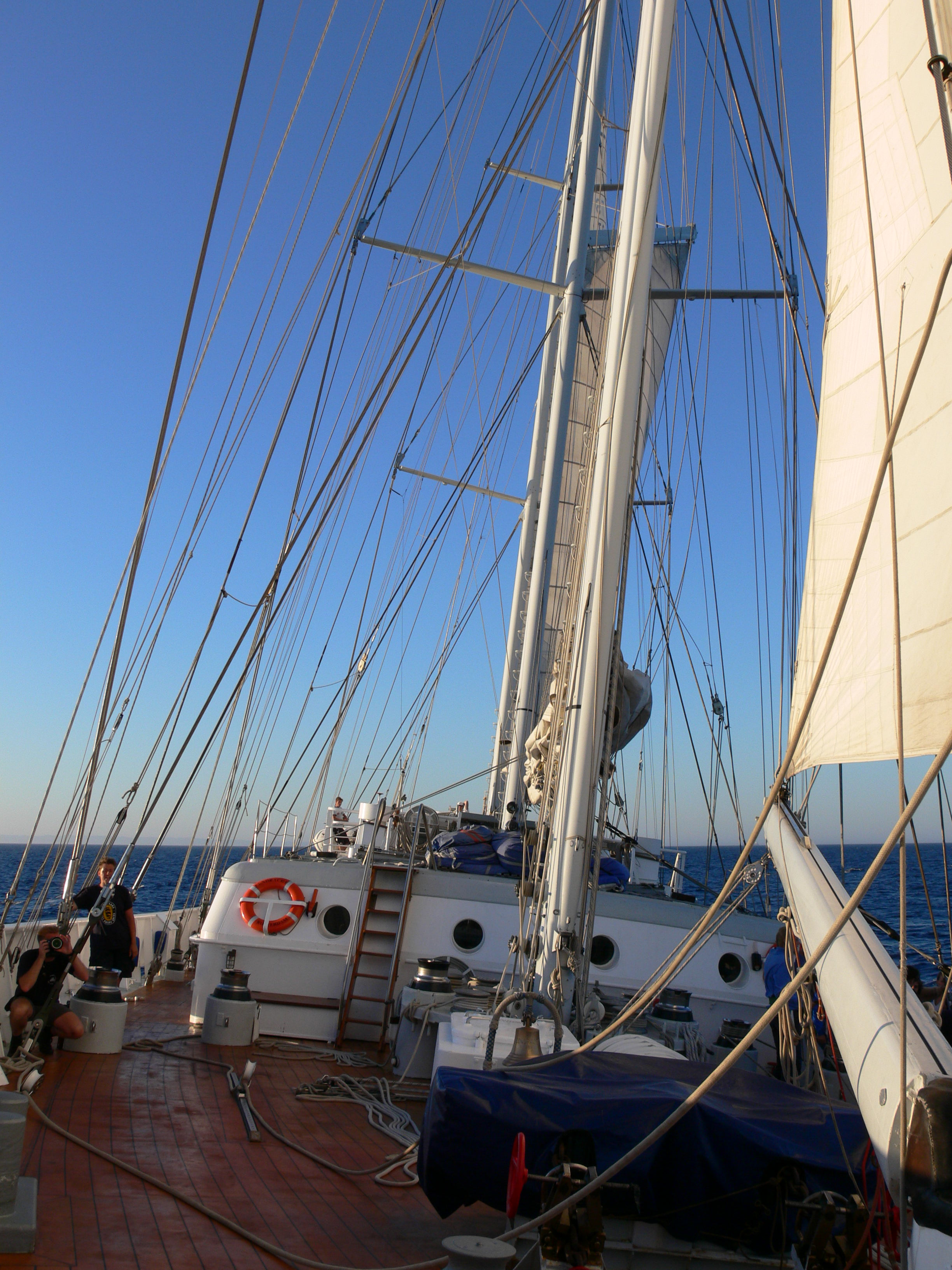 Zomer 2006 na vertrek uit de havenstad Cadíz